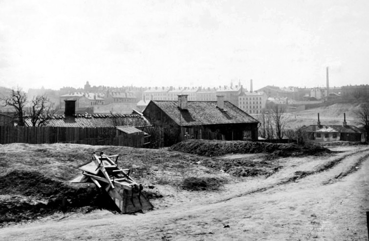 Vanadislunden mot sydväst 1902, Vasastadens hyreskaserner i bakgrunden och Cedersdals malmgård längs till höger.